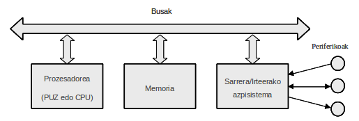 konpoutagailuaren arkitektura